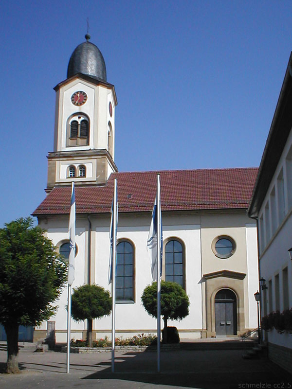 Katholische Kirche St. Johannes Baptista in Bad Friedrichshall-Untergriesheim, erbaut 1840